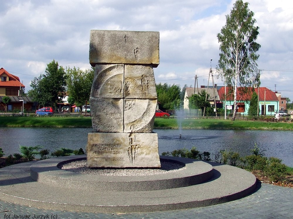 Pilawa